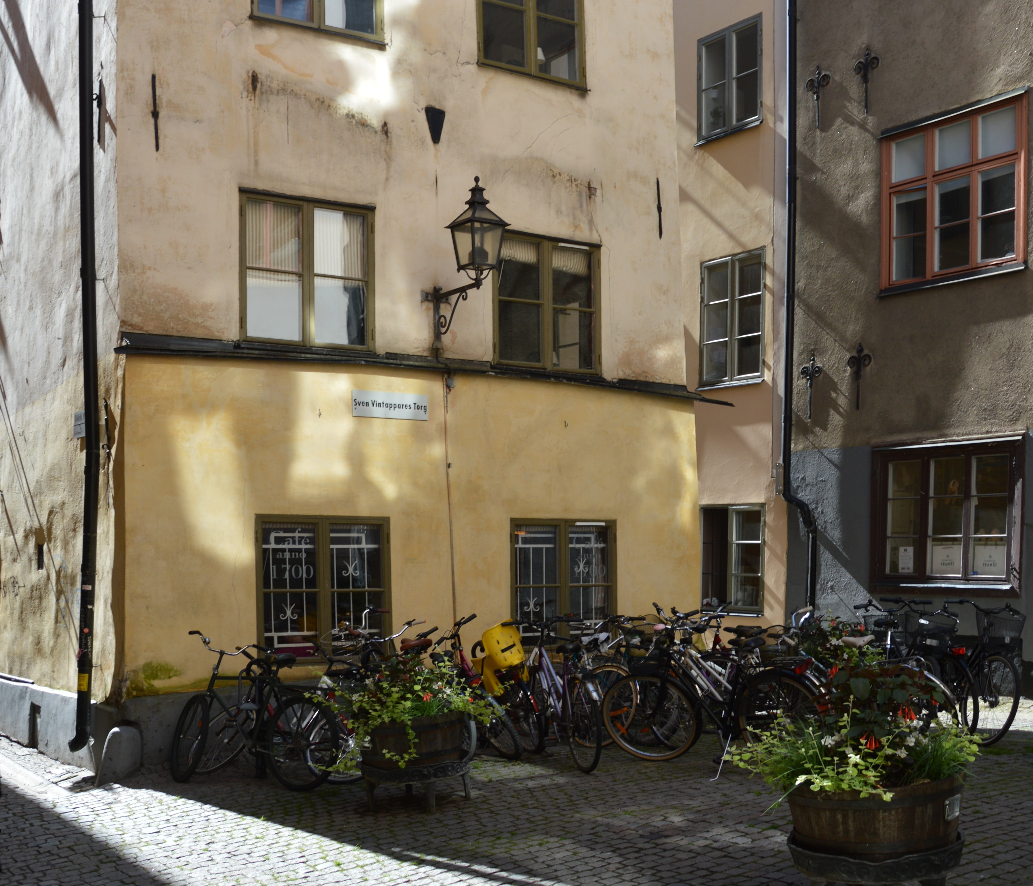 Sven Vintappares torg in Stockholm